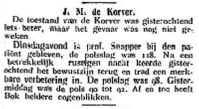 Krantenartikel in dagblad Het Vaderland over voetballer Bok de Korver, die bijna overleed aan een longontsteking